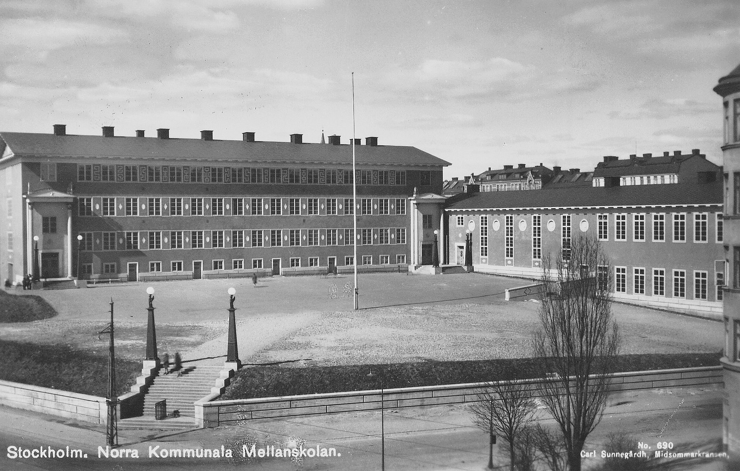 Norra Kommunala mellanskola vid Fridhemsplan (senare Fridhemsplans gymnasium )